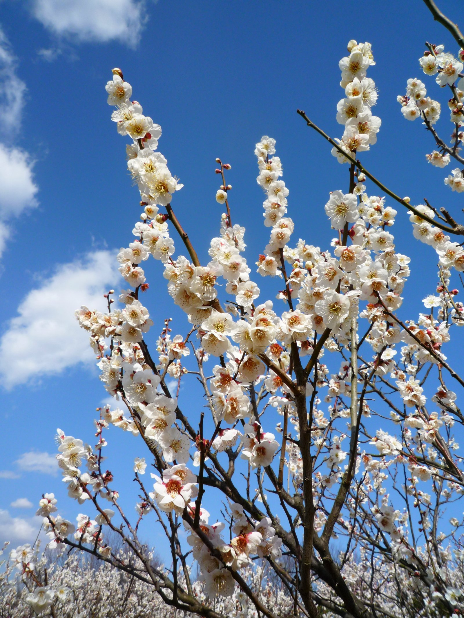 大高緑地公園 (愛知県名古屋市緑区大高町)